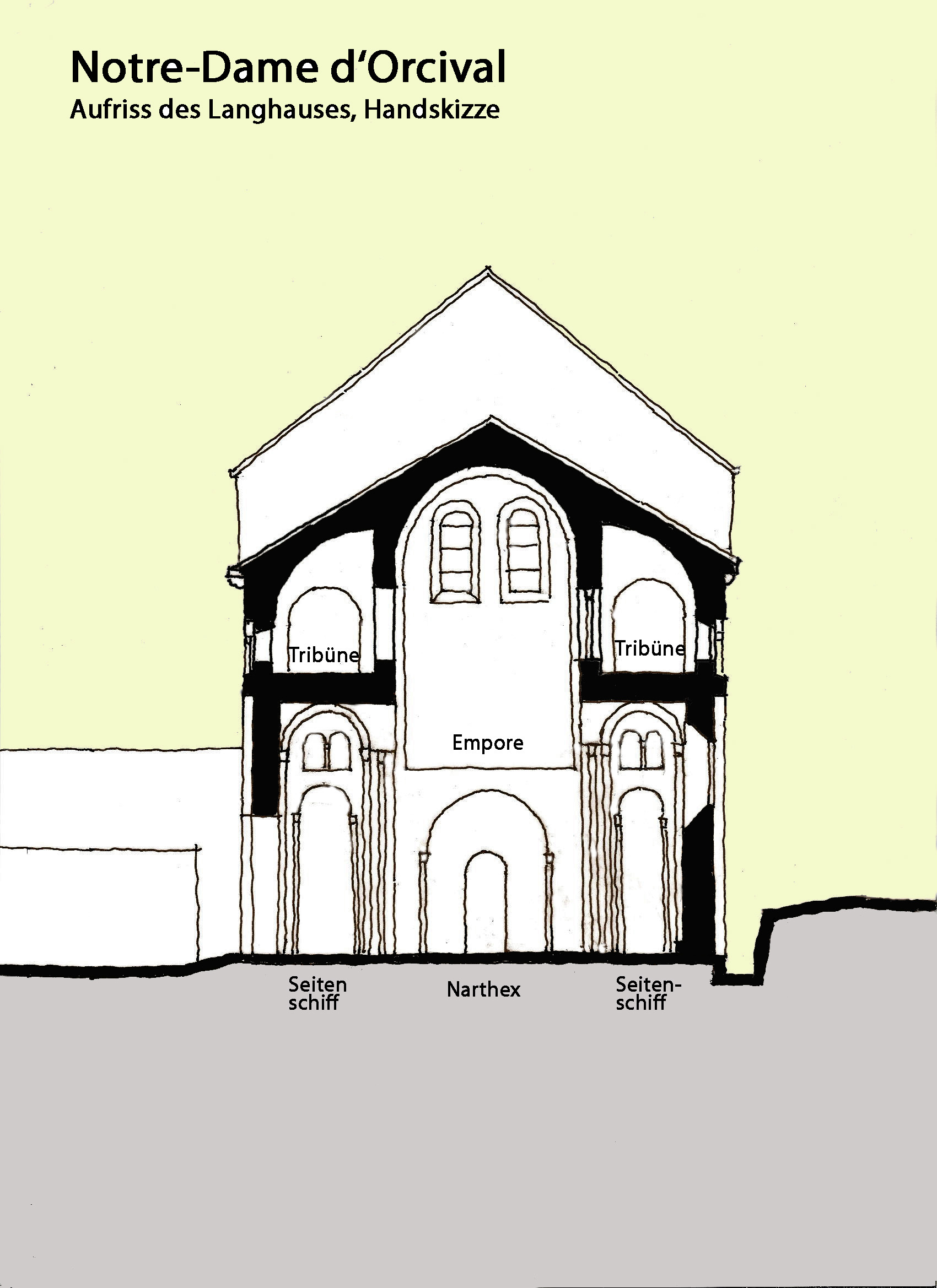 N.-D. d'Orcival, Aufriss, Handskizze